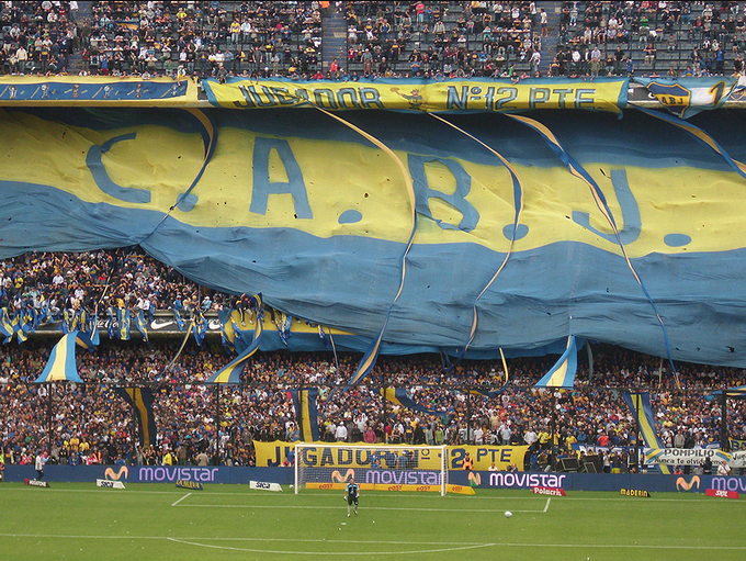 Hinchas de Boca Juniors en un partido entre Boca Juniors vs. Racing Club, el 9 de julio de 2011.